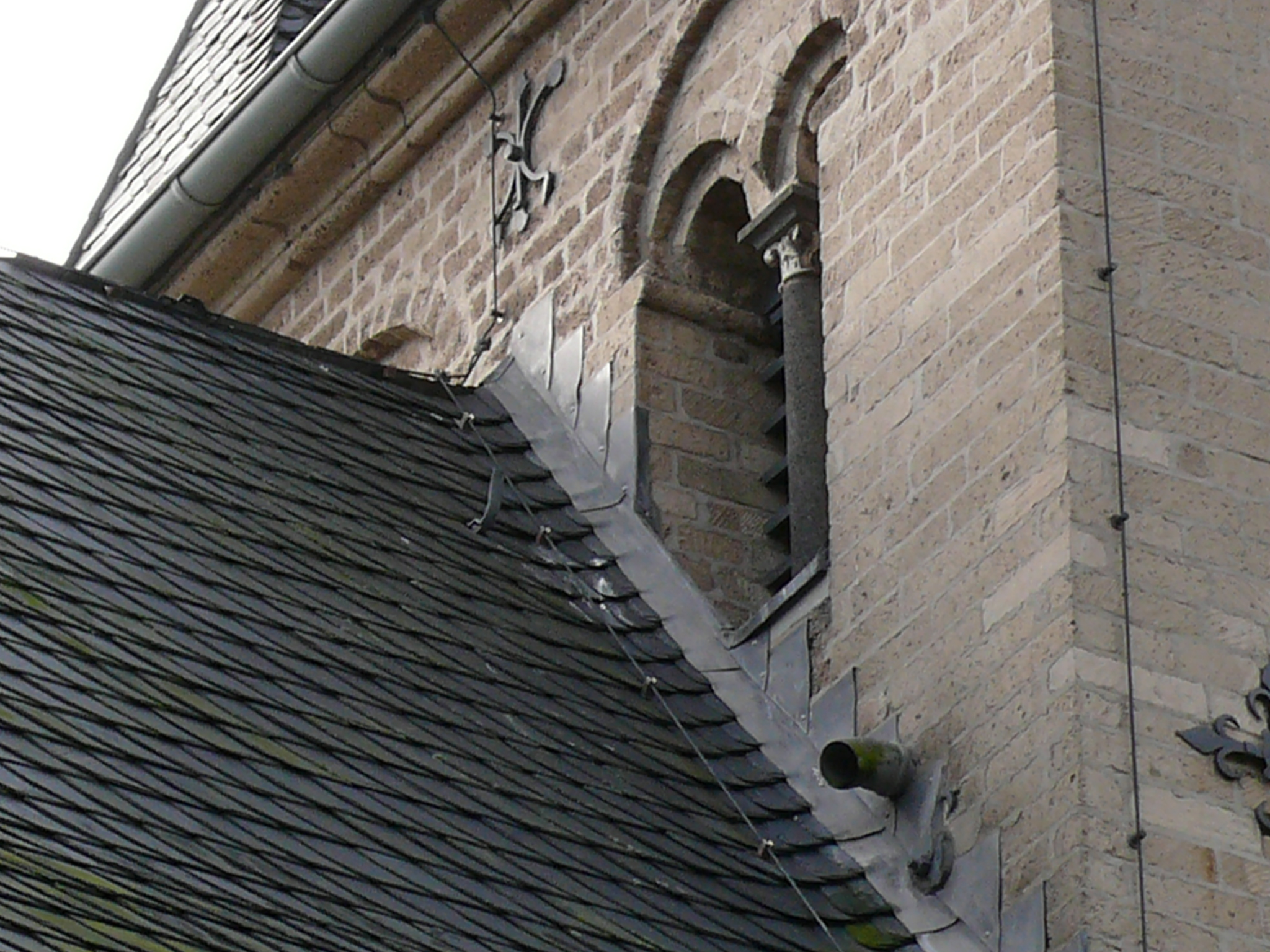 Kirchendach Sankt Brictius Oekoven - nachträgliche Änderung der Dachneigung.